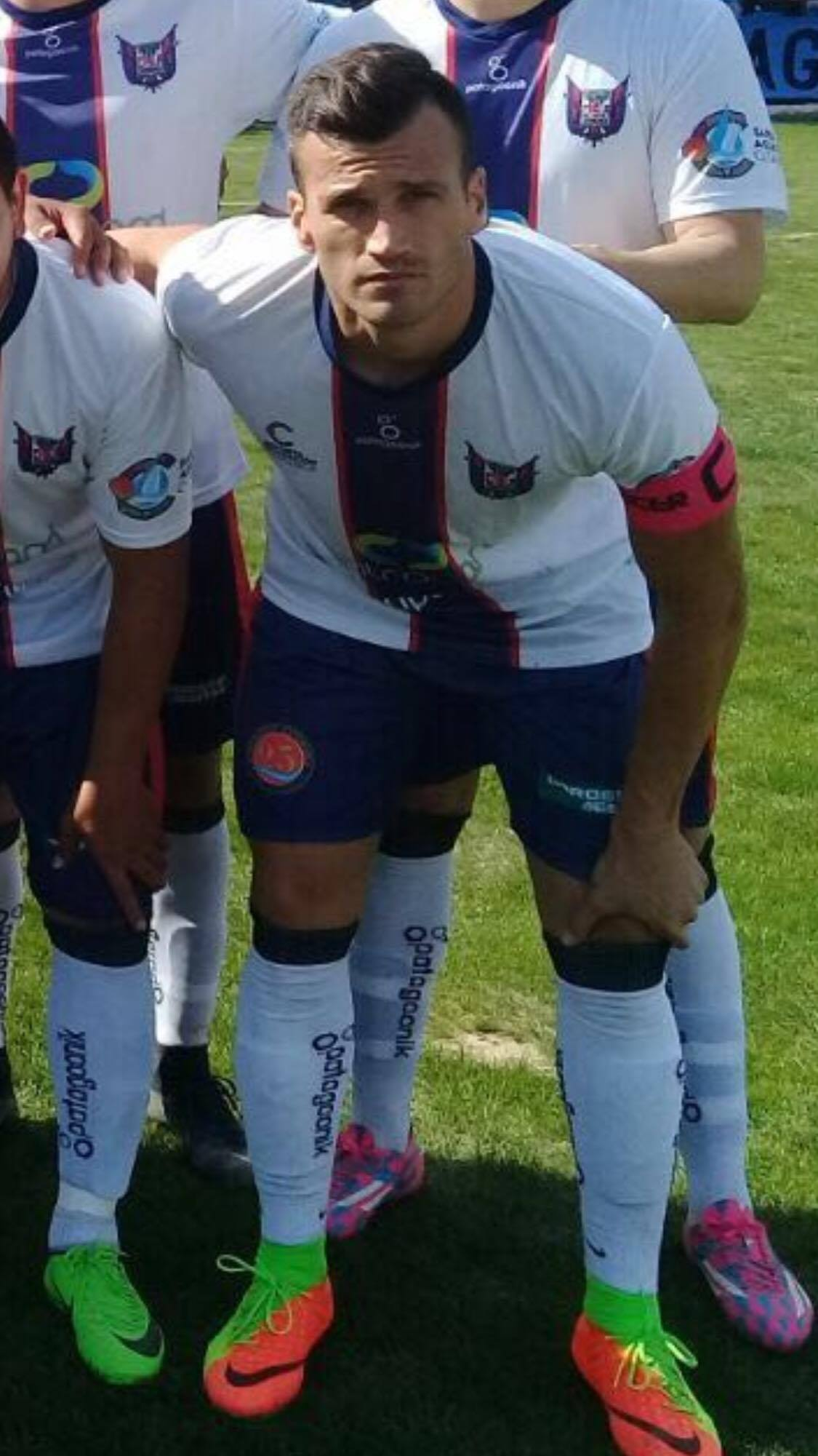 san lorenzo de alem